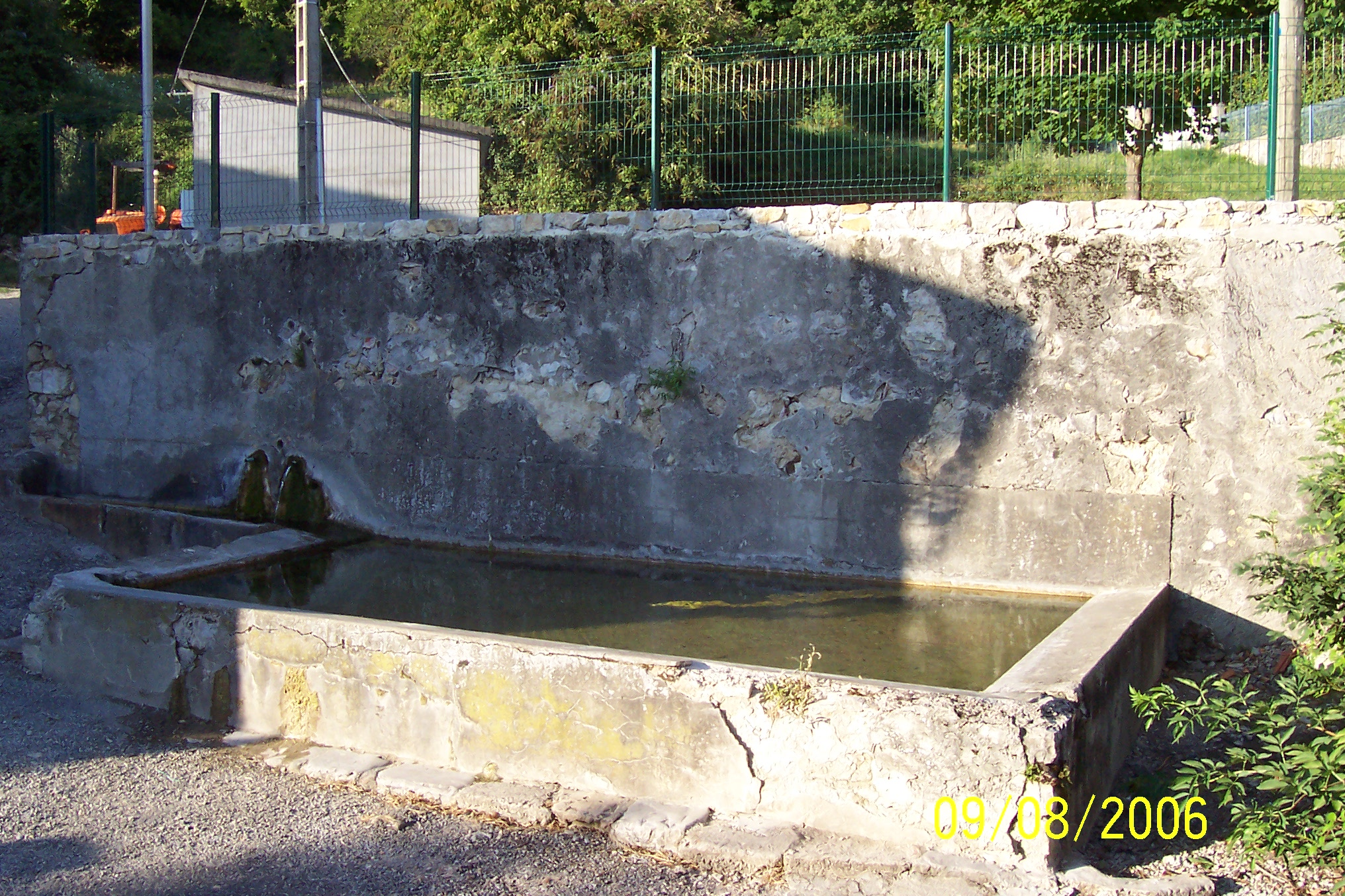 Abreuvoir de Leychert